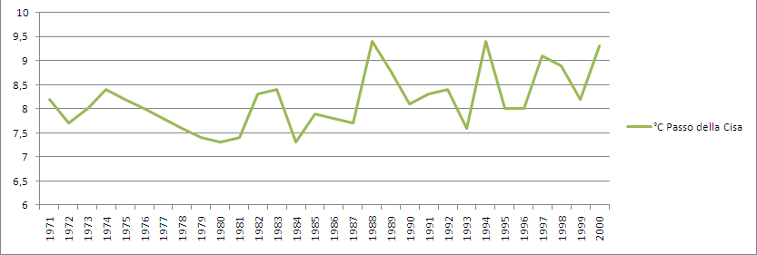 Stazione meteorologica di Passo della Cisa: andamento della temperatura media annua dal 1971 al 2000.